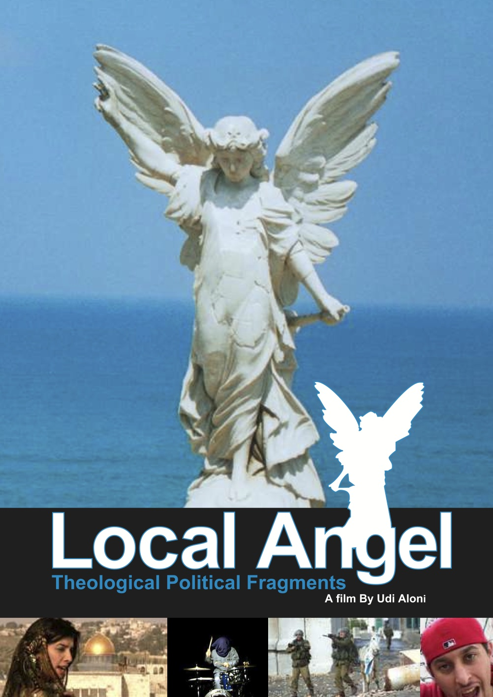 אודי אלוני הוא במאי, סופר ואמן חזותי ופעיל שמאל רדיקלי ישראלי., בנה של שולמית אלוני פוסטר הסרט מלאך מקומי